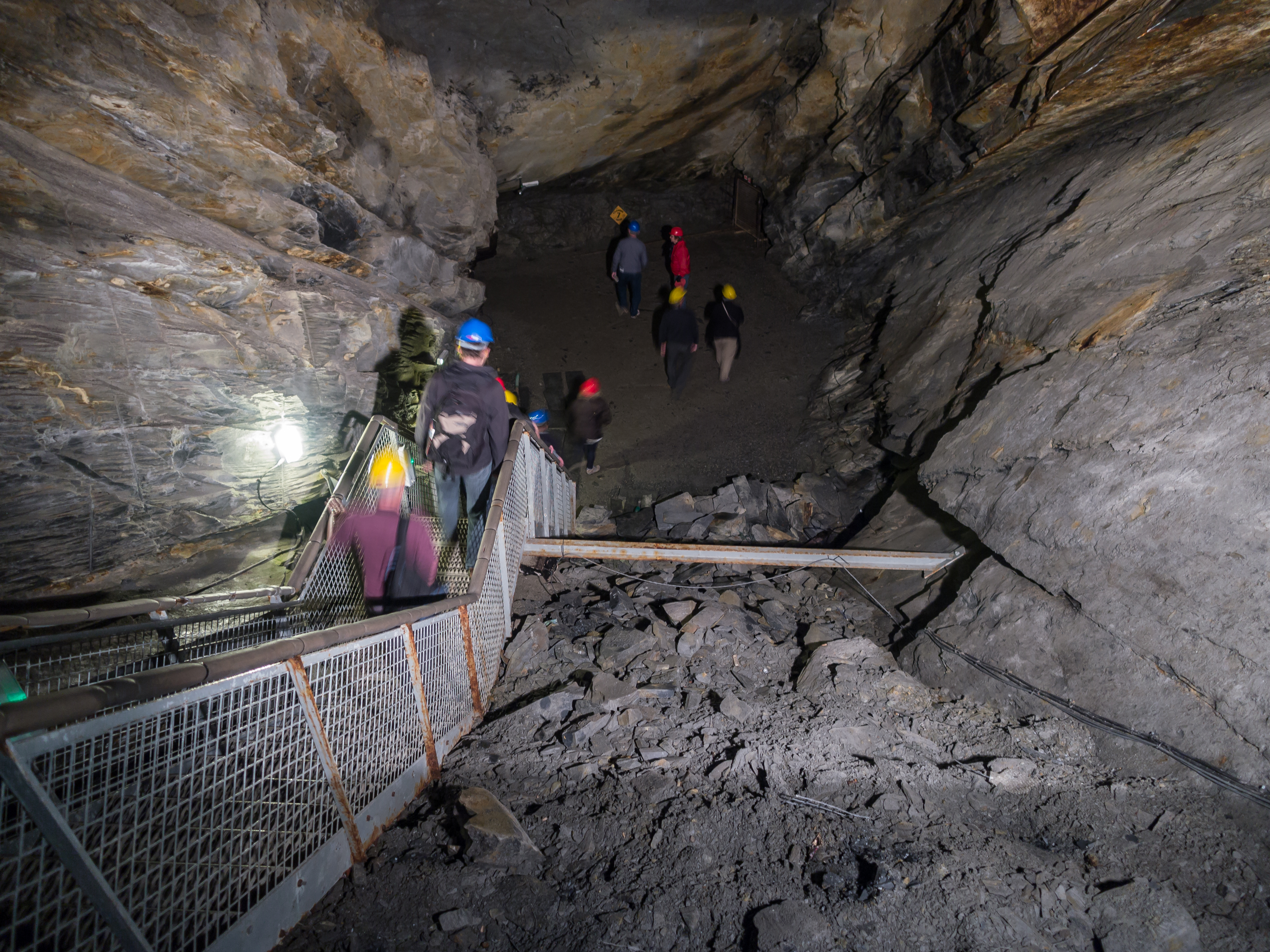 Slate mine tour, Blaneau Ffestiniog